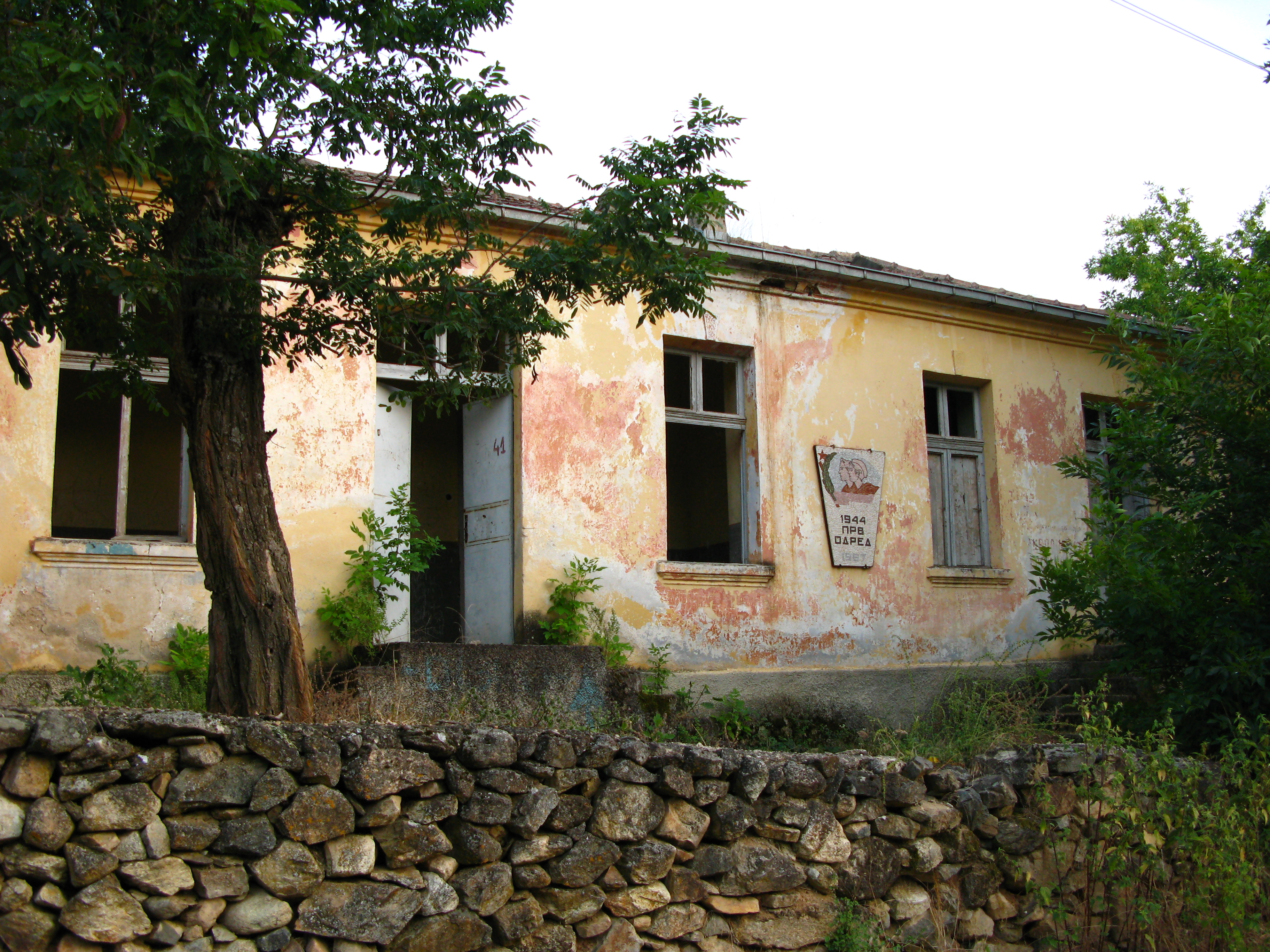 Изоставено основно училище в битолското село Сърбци.